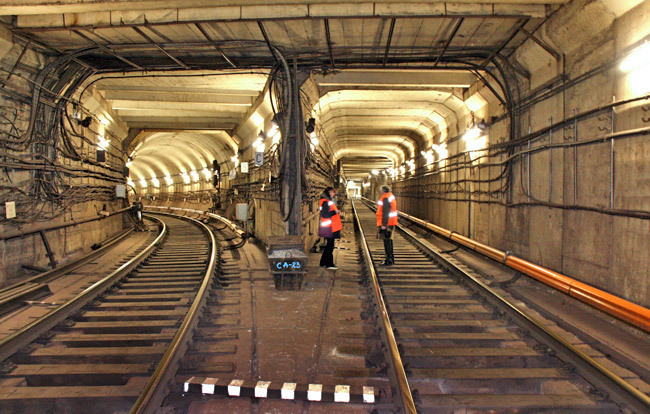 Тоннель Автозаводской линии Минского метрополитена. В конце правого перегонного тоннеля виднеется станция «Купаловская». Слева — служебная соединительная ветвь на Московскую линию.